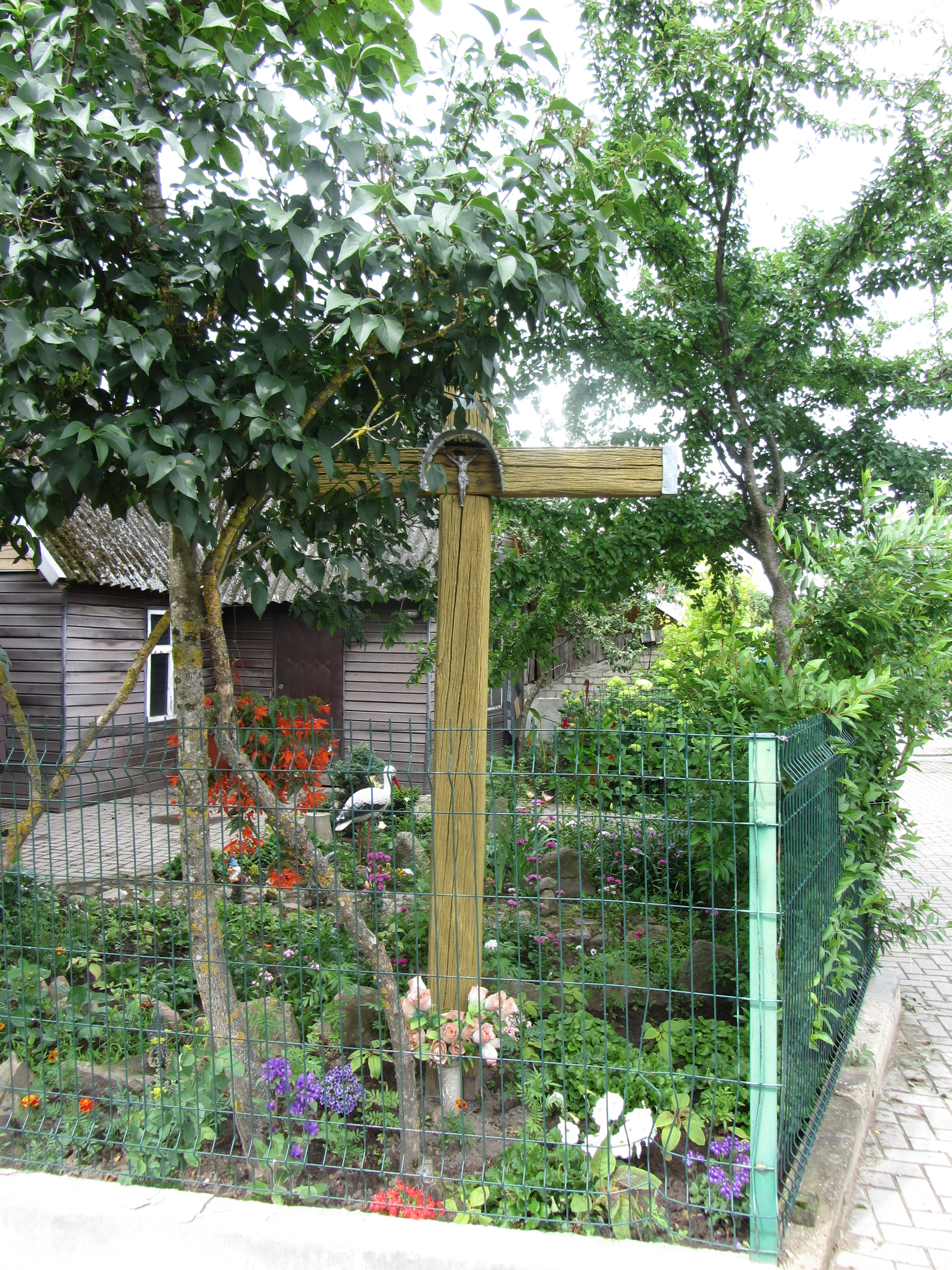 Buivydai 14221, Lithuania